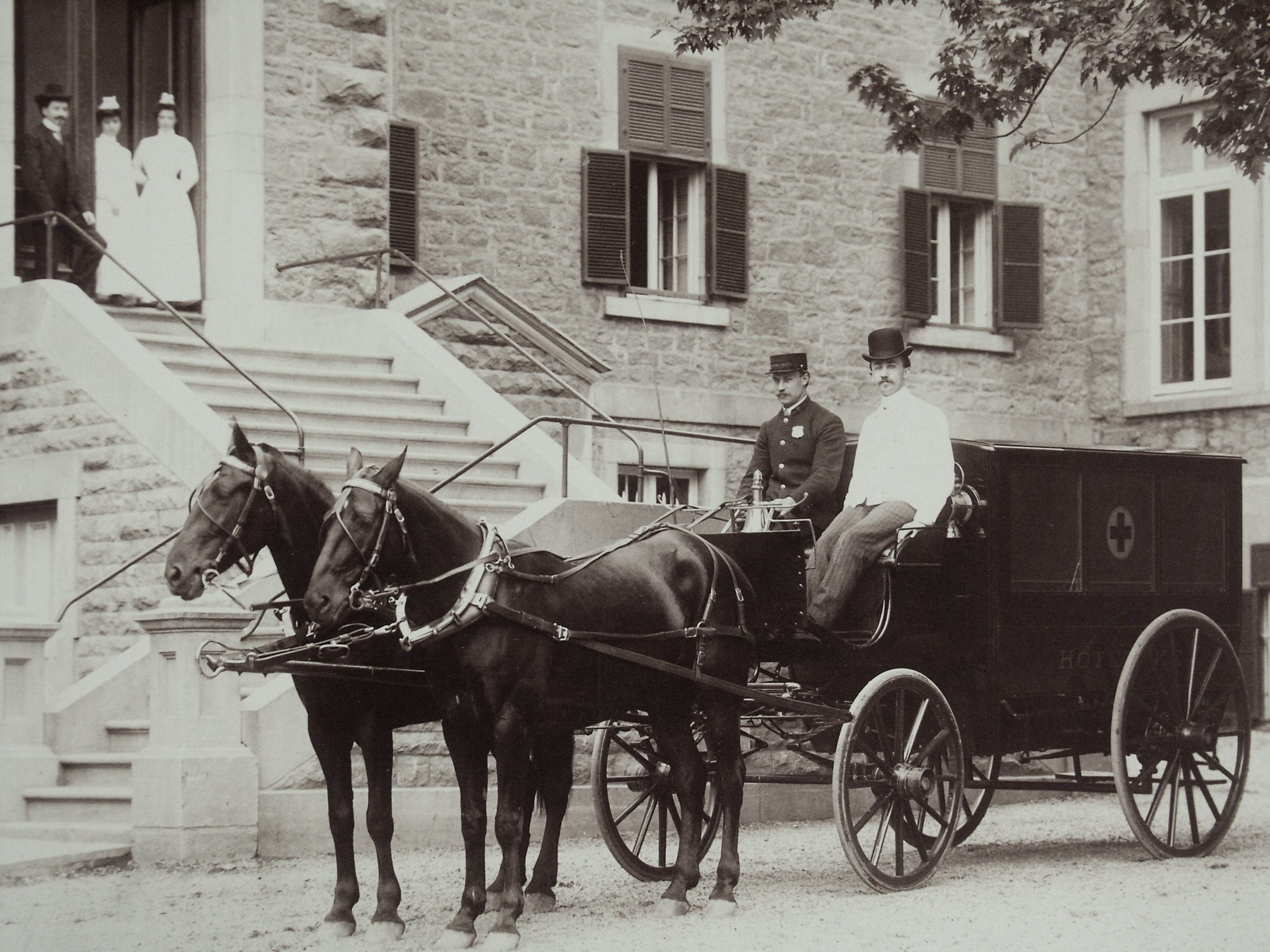 Ambulance, à l'Hôtel-Dieu de Montréal, vers 1904